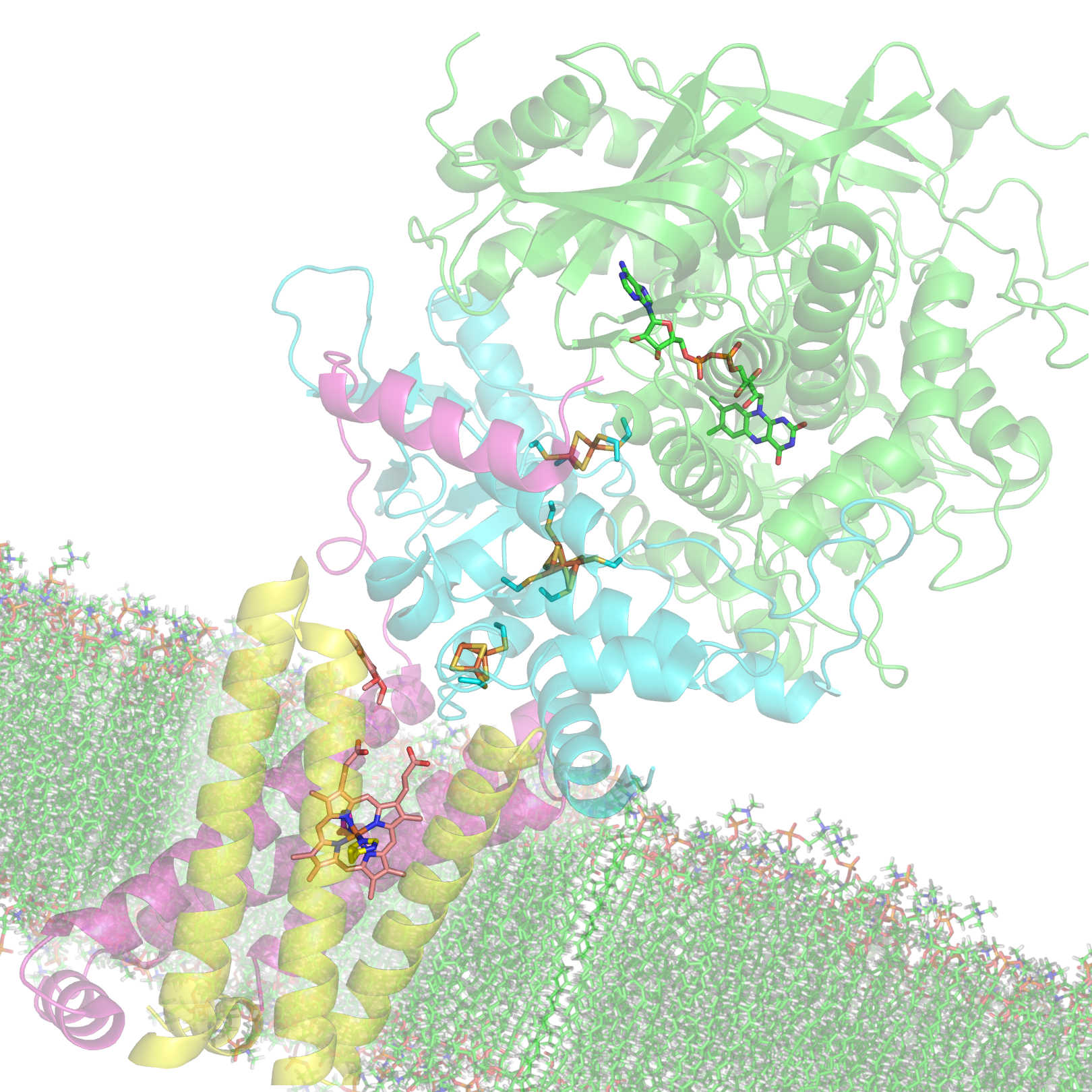 Succinate dehydrogenase complex